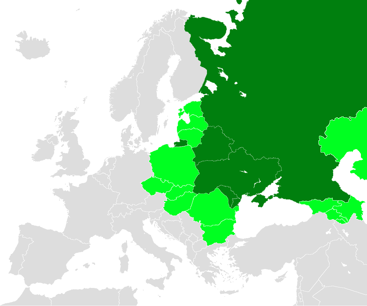 Исправил отображения рек